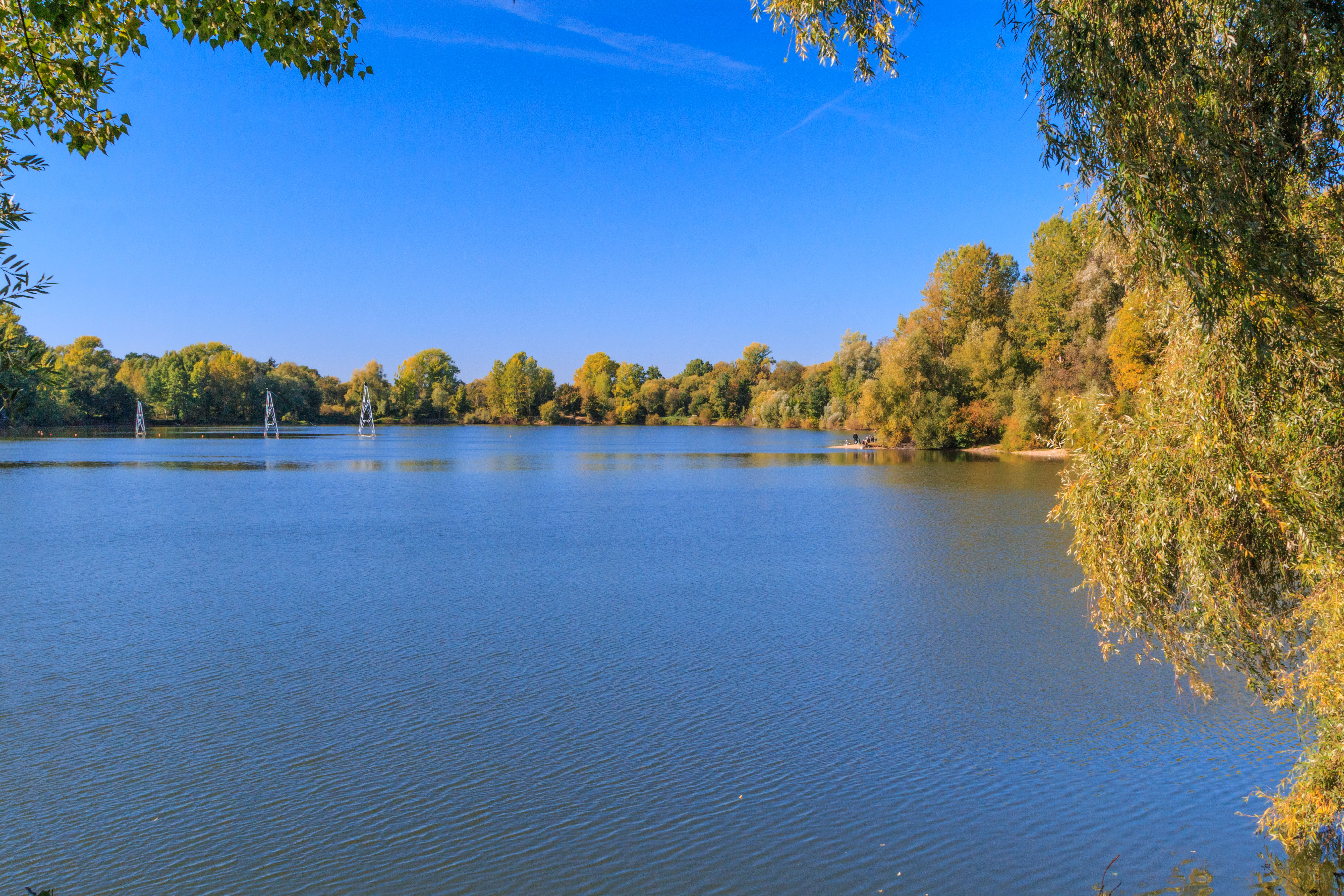 Pískovna Veselá u Mnichova Hradiště Project: Vodstvo.